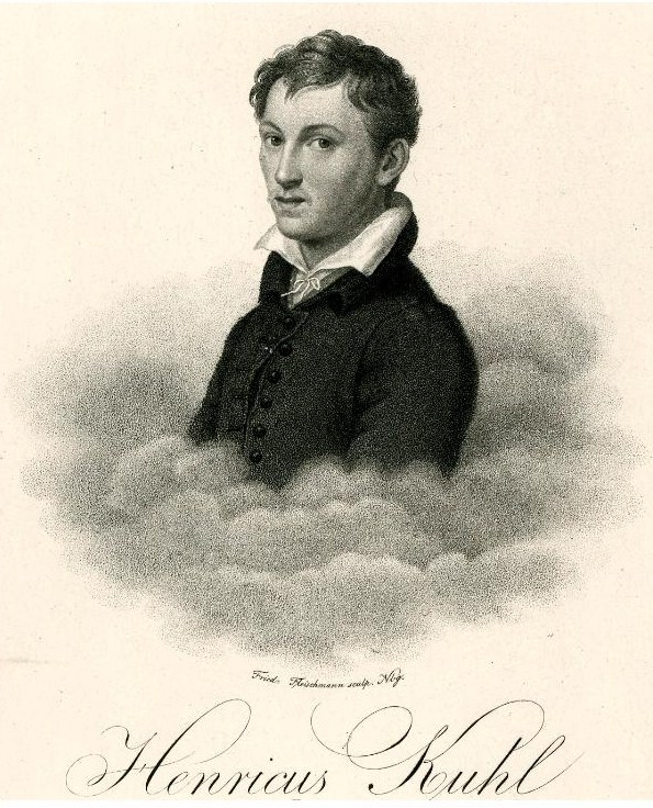 Генрих Куль (1797-1821)